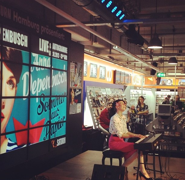 Anna Depenbusch Showcase